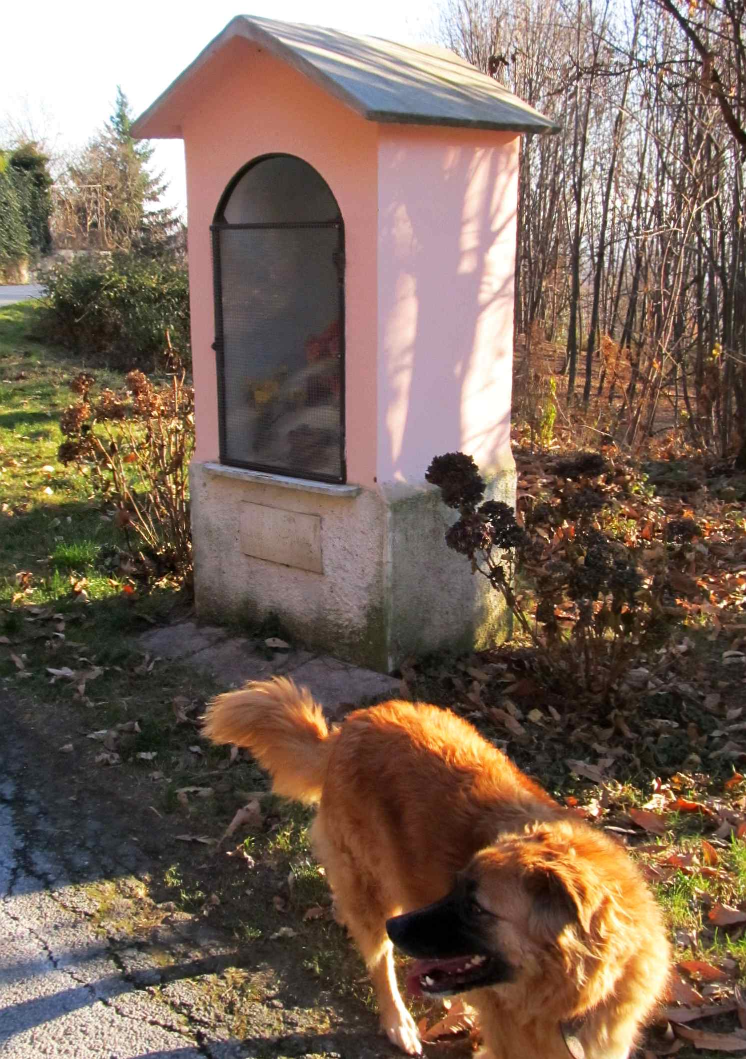 Pilone votivo in memoria della Peregrinatio Mariae (1949) in località Mojen (tra la Colma di Biella e Vaglio Pettinengo, BI)